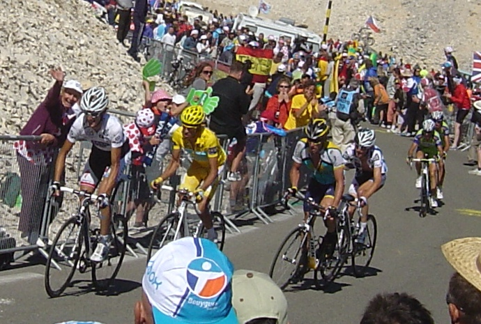 Le groupe maillot jaune lors de la 20e étape du Tour de France 2009 au Mont Ventoux